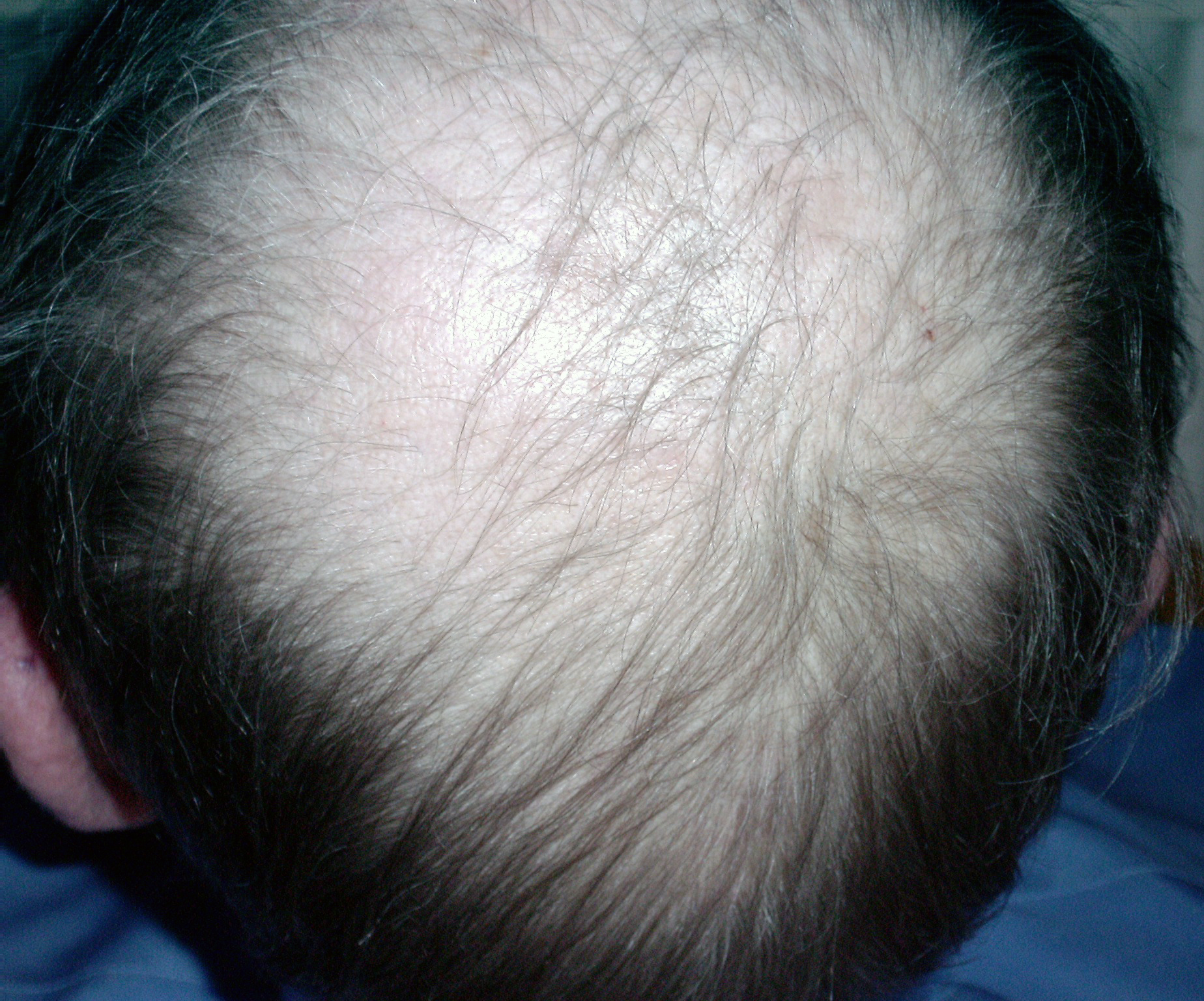 Baldish man.